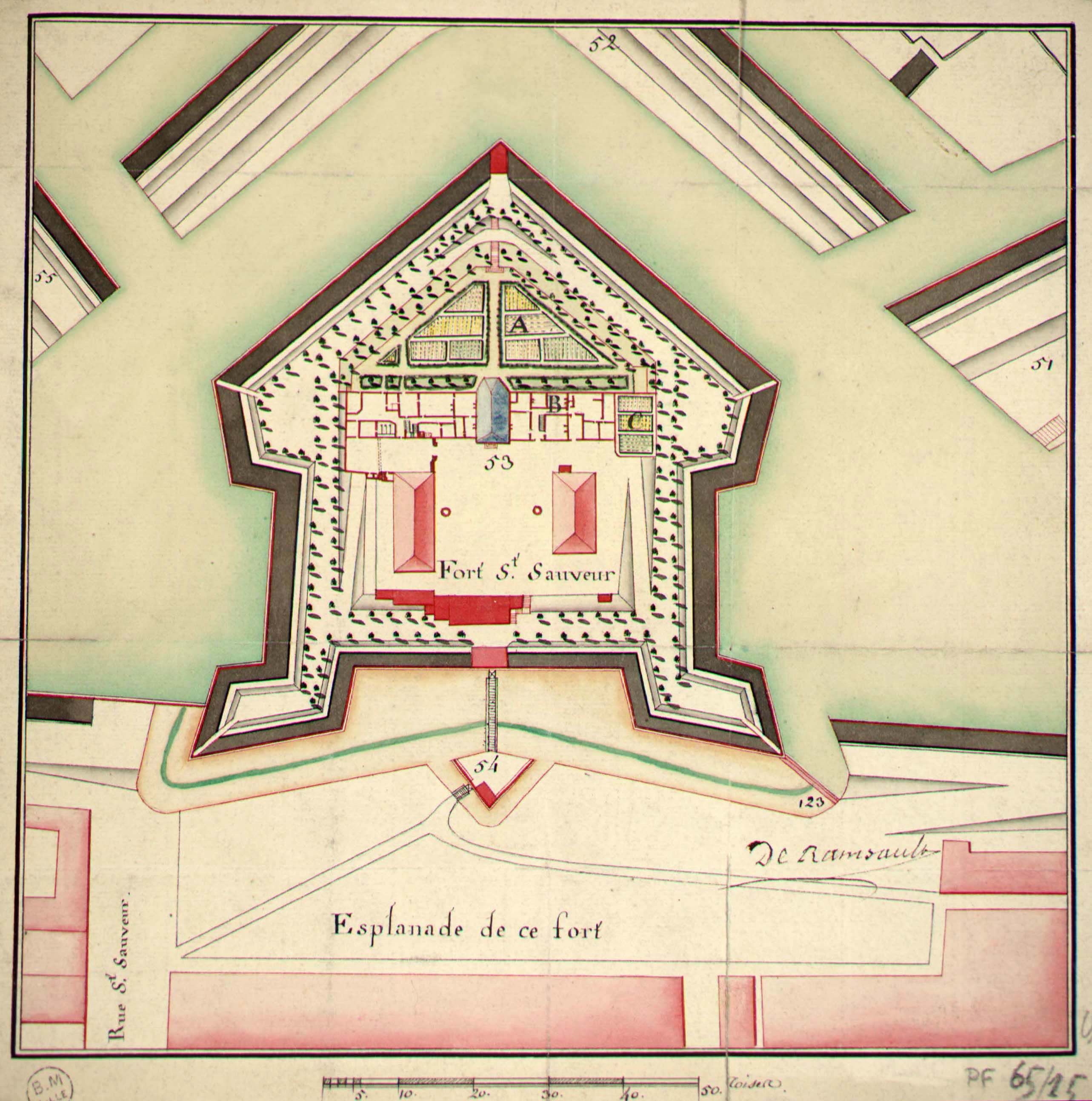 Titre du document: Plan du fort Saint-Sauveur à Lille Le document ne contient pas de titre à l'origine. Cote Bibliothèque Municipale de Lille : portefeuille 65, 15 Type de document : Plan 28,5 x 28,5 cm